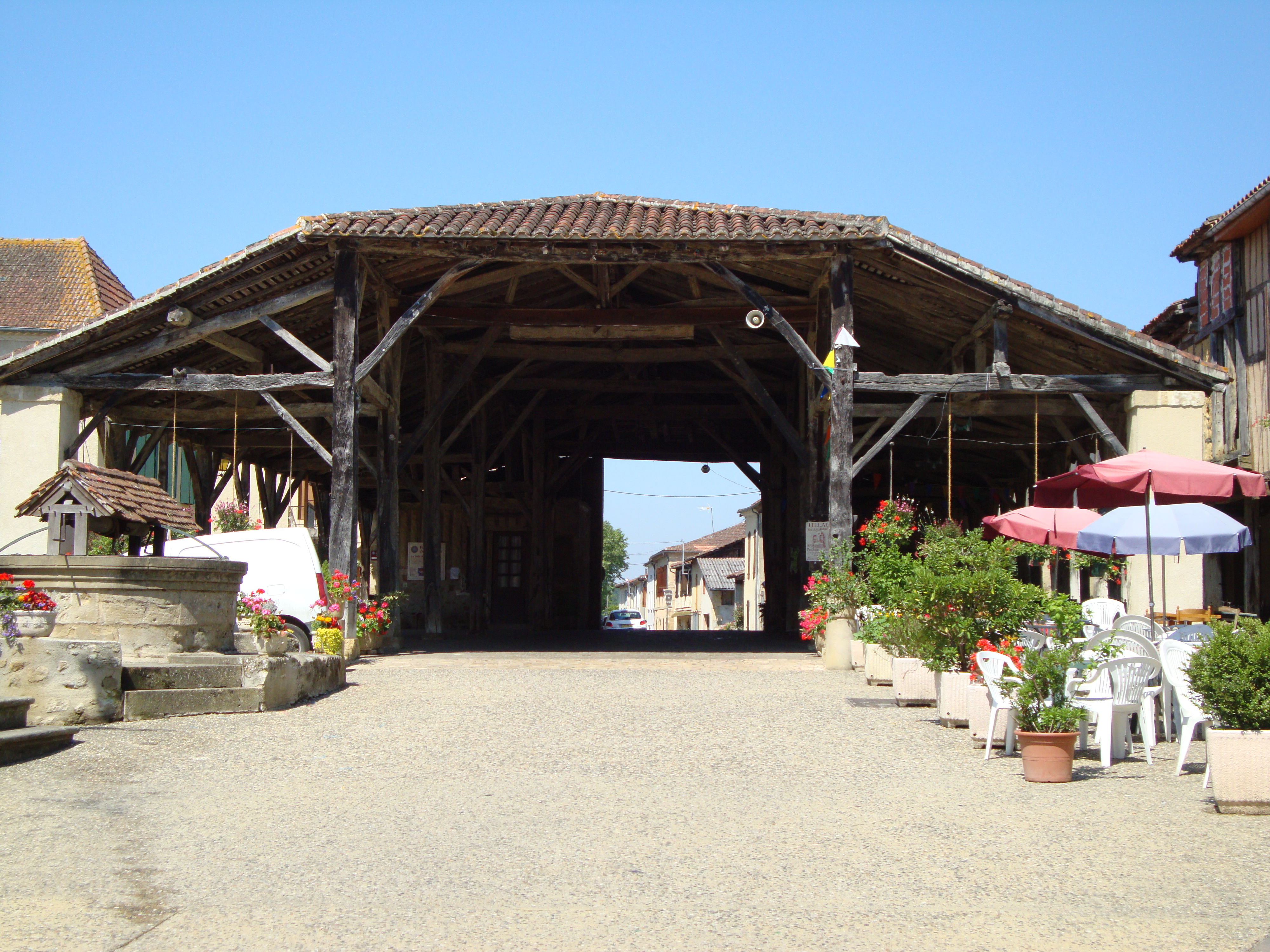 Bassoues (Gers) halles et puits